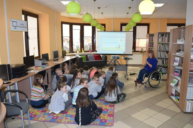 Przasnysz. Biblioteka Miejska. Uczniowie SP1